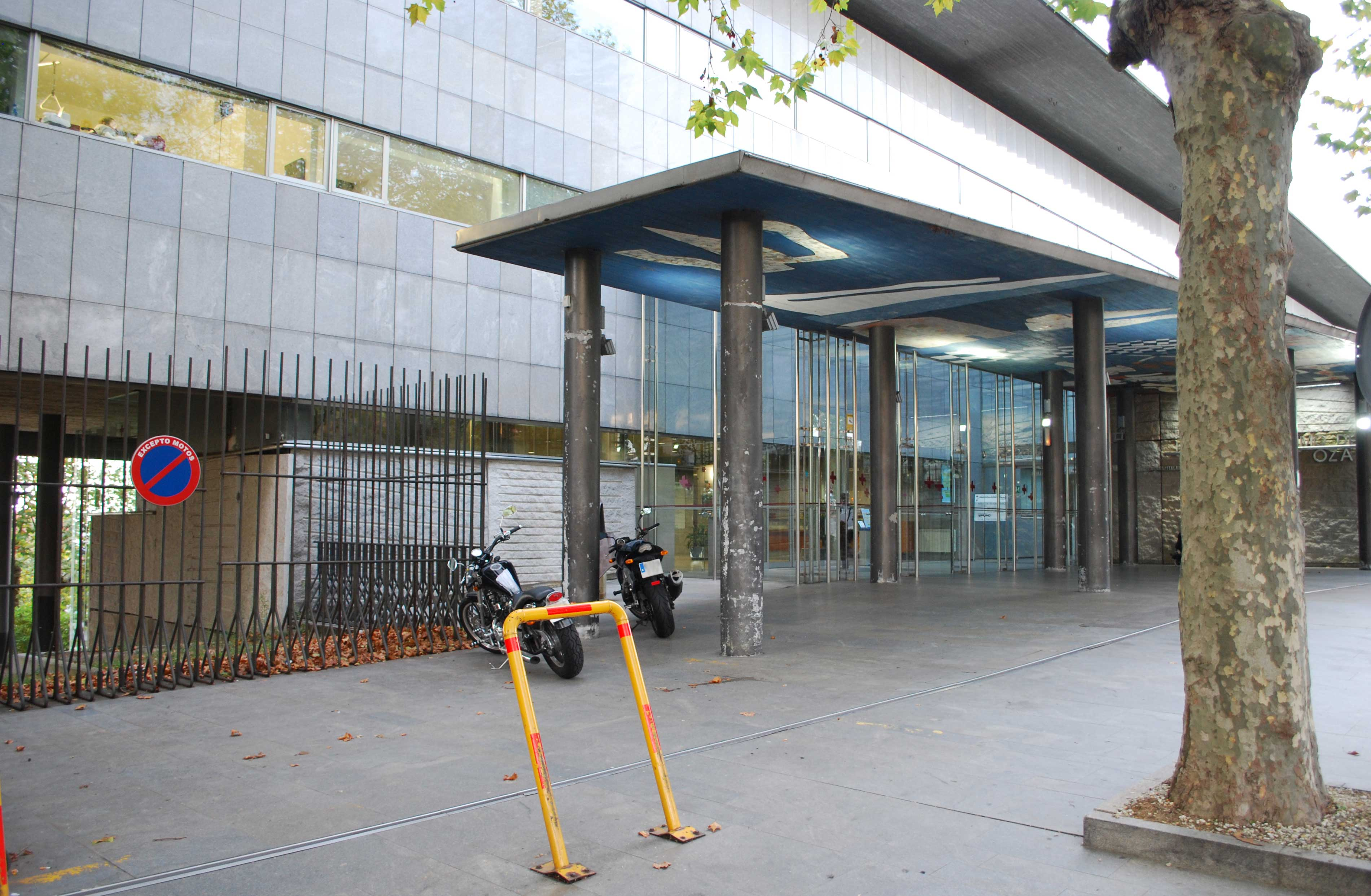 Hospital Marítimo de Oza As Xuvias A Coruña Galiza Spain Sergas